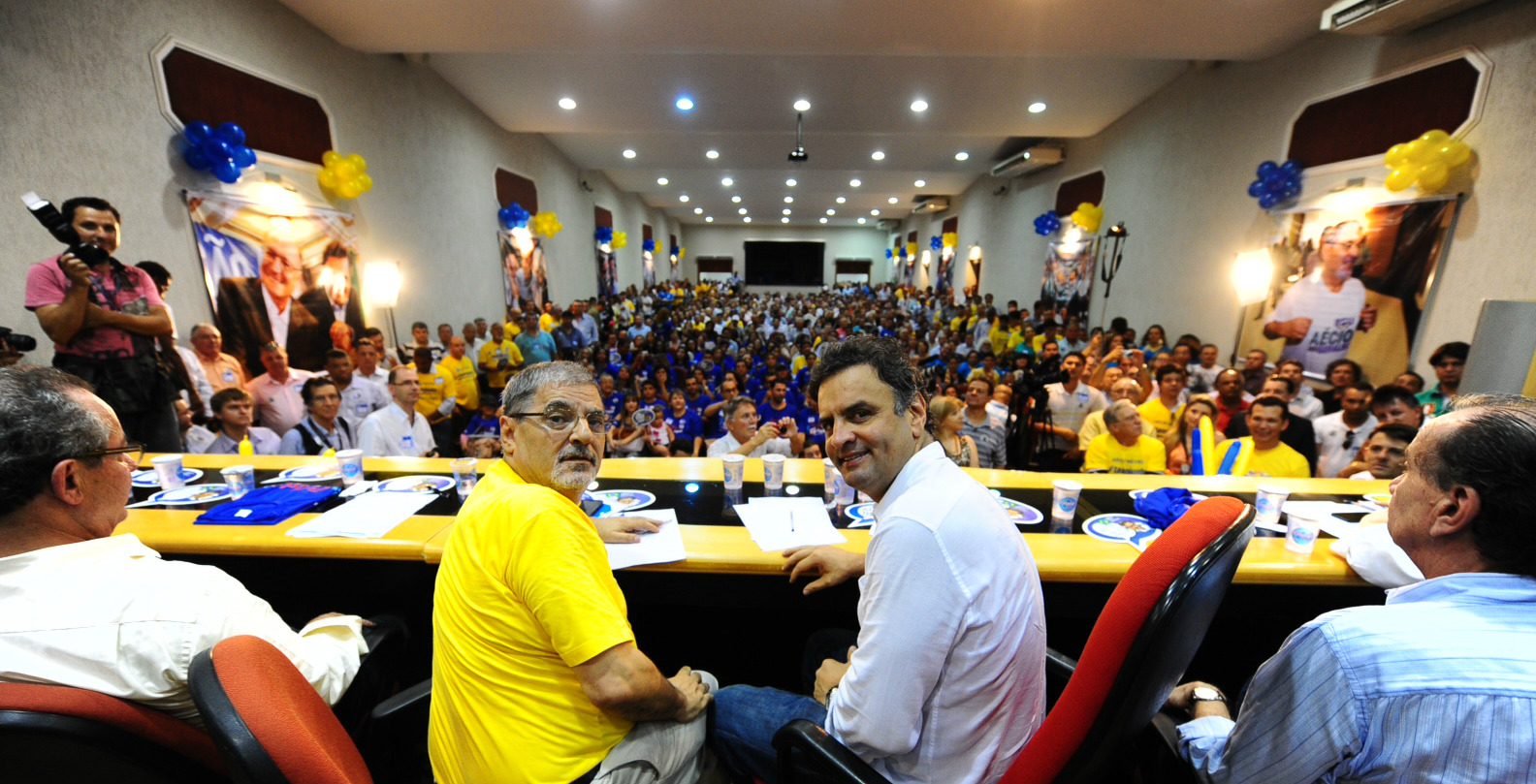 O presidente do PSDB, senador Aécio Neves, participa, neste sábado (30/11), de encontro com cerca de 1.200 pessoas em Bauru, interior de São Paulo. Acompanhado do líder do PSDB no Senado, senador Aloysio Nunes, do secretario de Energia de São Paulo, José Aníbal, e do deputado estadual Pedro Tobias, Aécio Neves reuniu-se com deputados, prefeitos, vereadores e lideranças da região. Foto: George Gianni